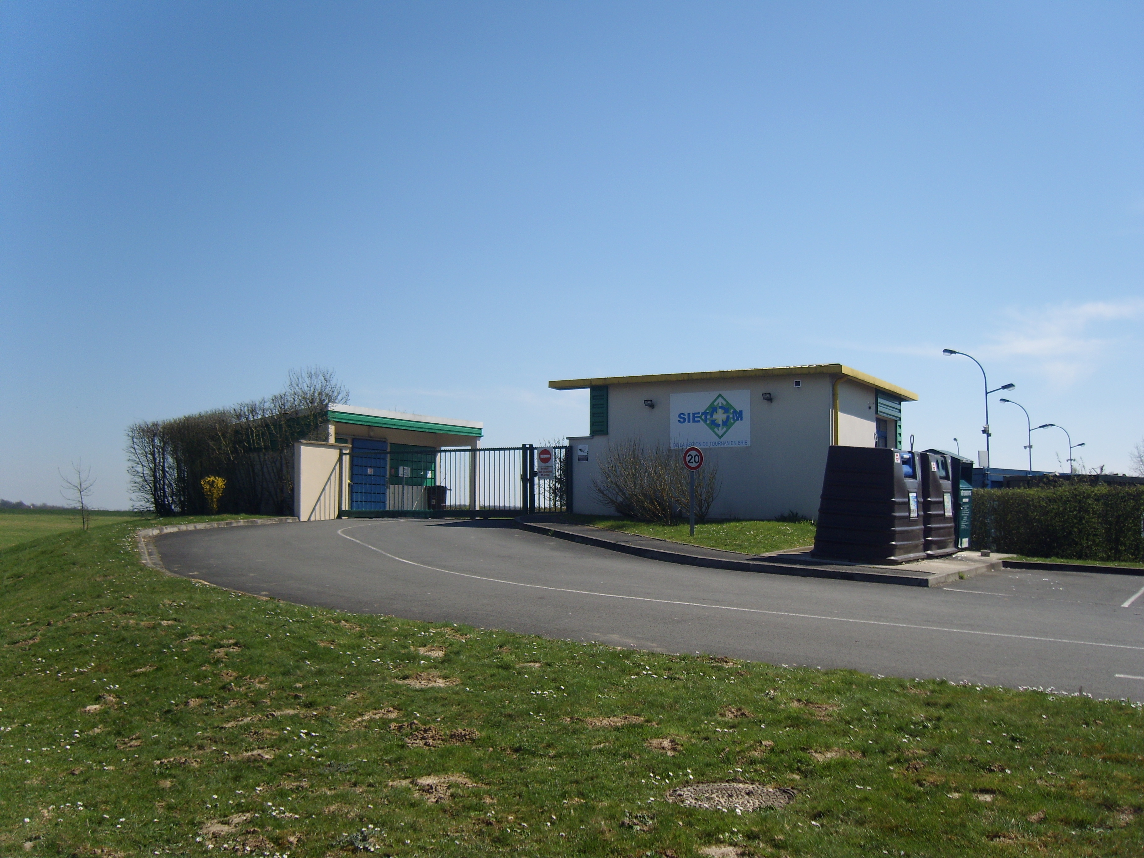 La déchèterie de Fontenay-Trésigny